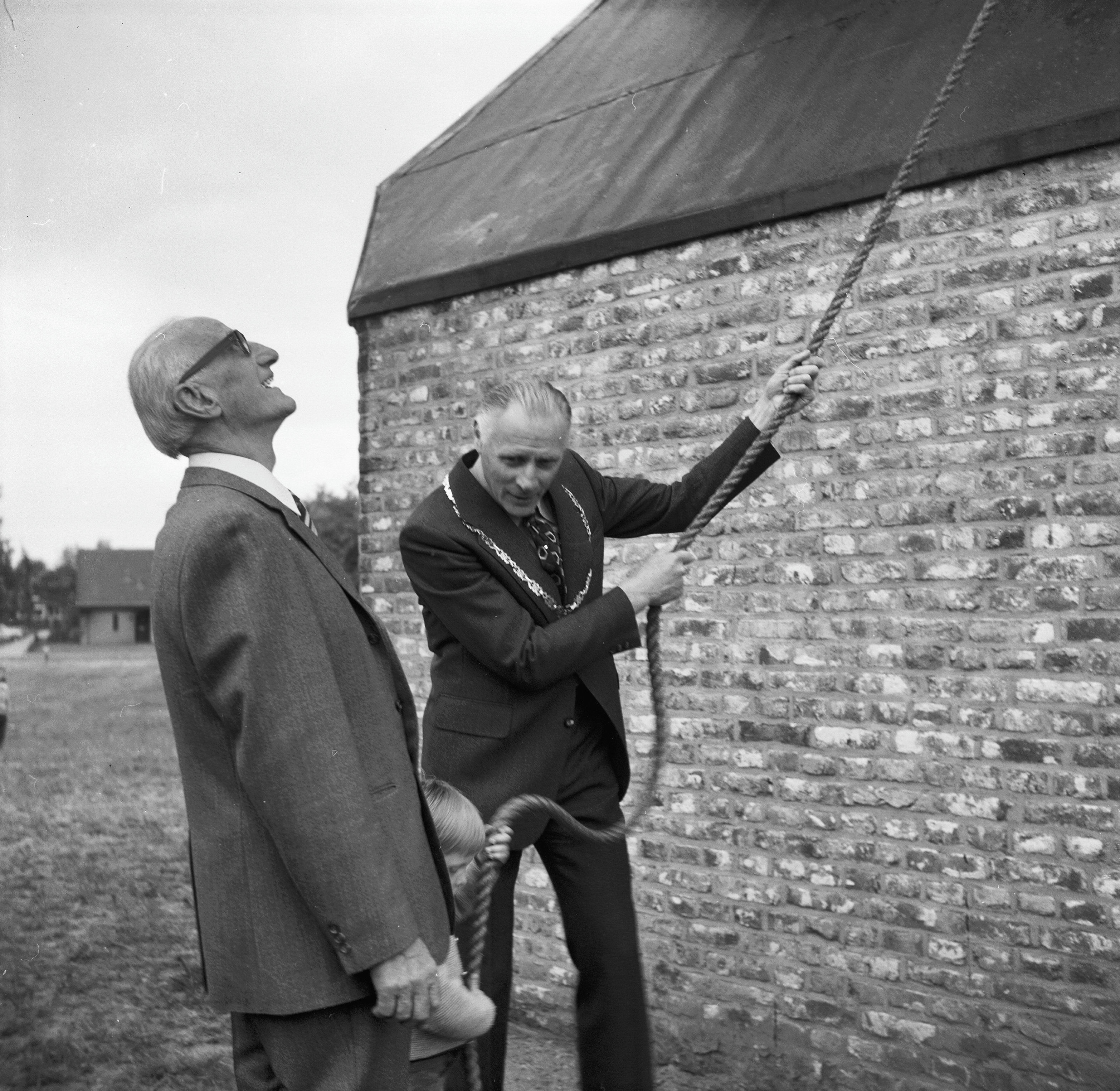 De Oostenwind: Standerdmolen, tijdens de ingebruikstelling door de burgemeester